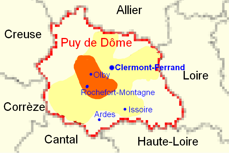 Aire de dominance relative (en ocre) et aire de présence (en jaune) de la race Rava dans on département d'origine, le Puy de Dôme, d'après la carte publiée par Edmond Quittet en 1965.